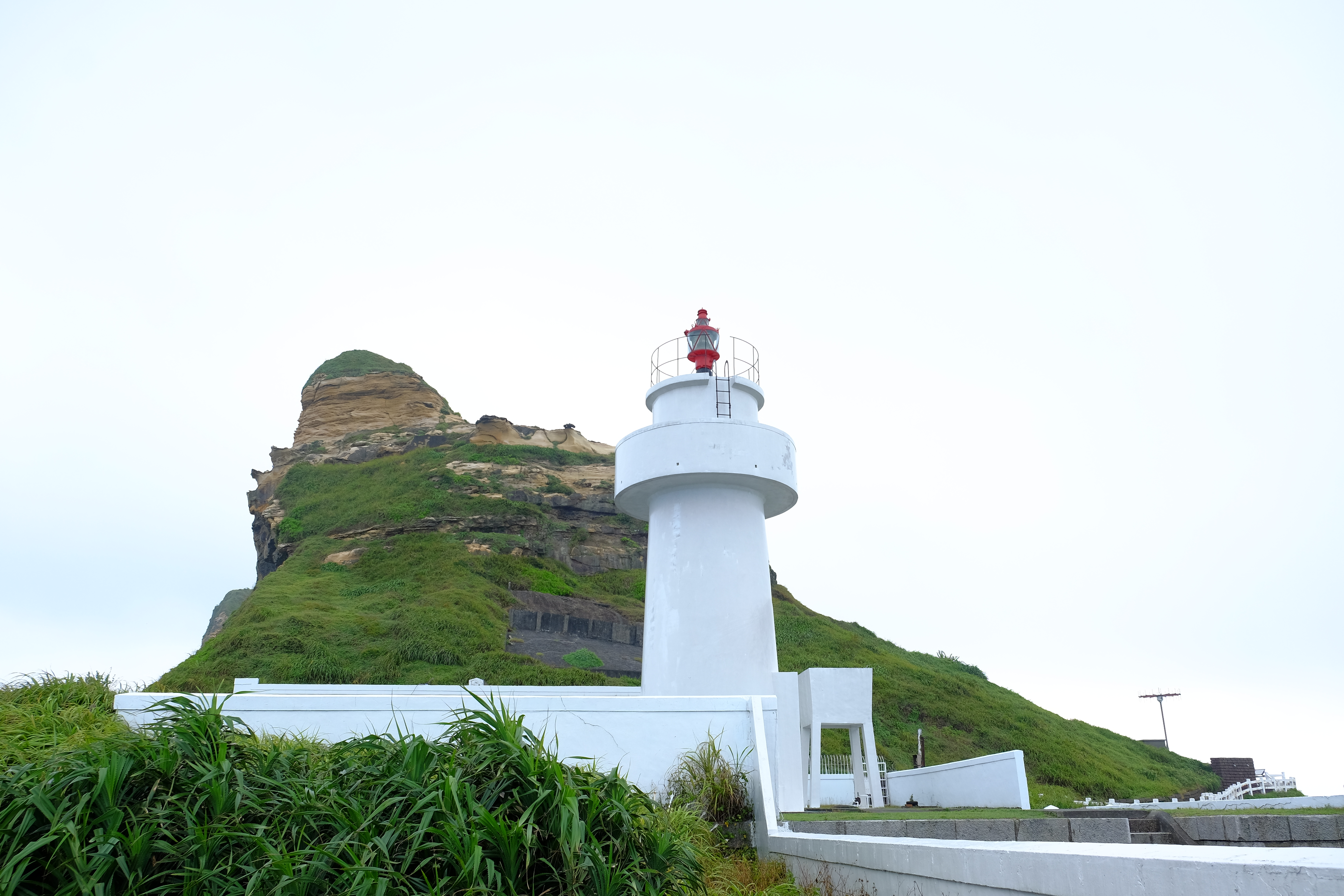 鼻頭角燈台